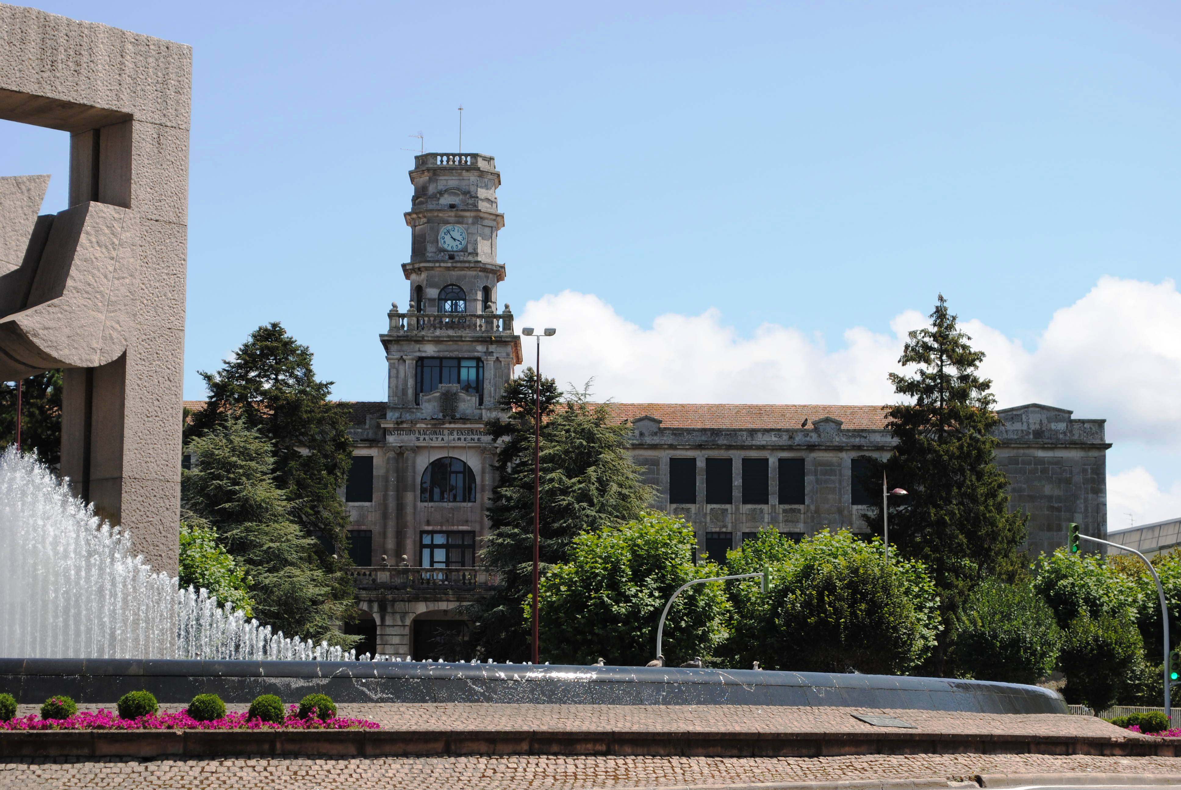 Vexa o título e as categorías.